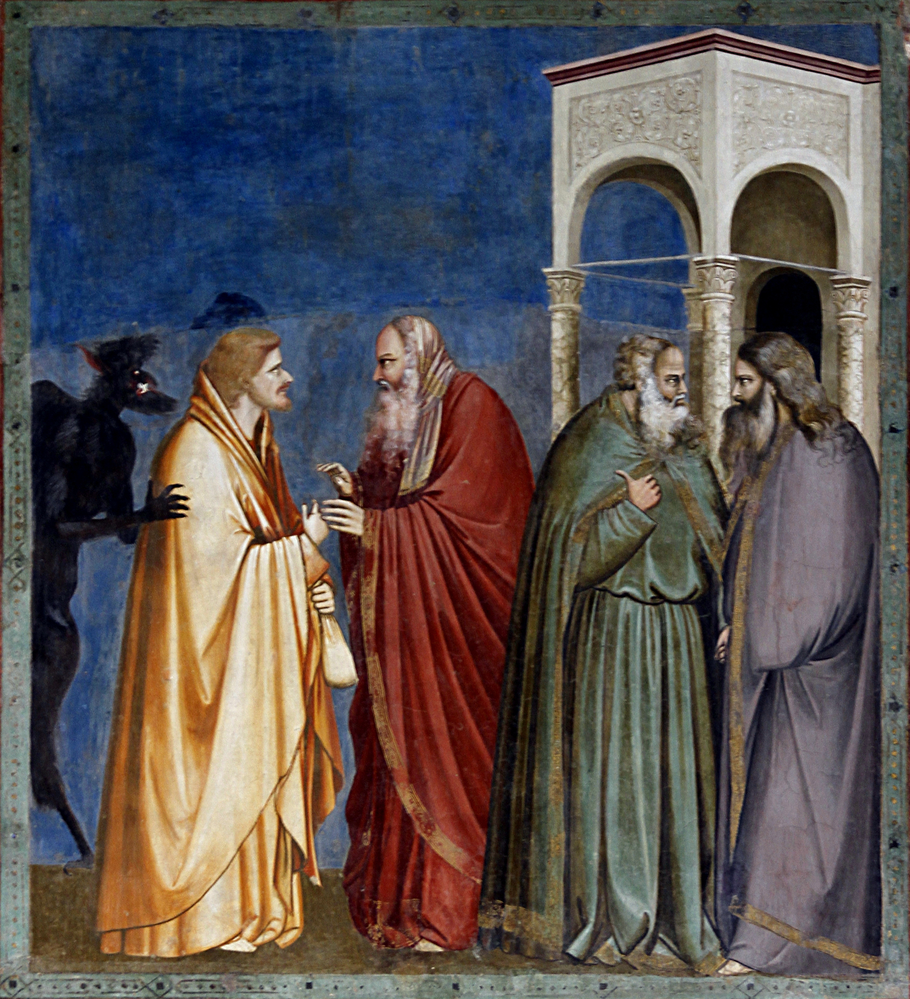 Capella dei Scrovegni - Padua